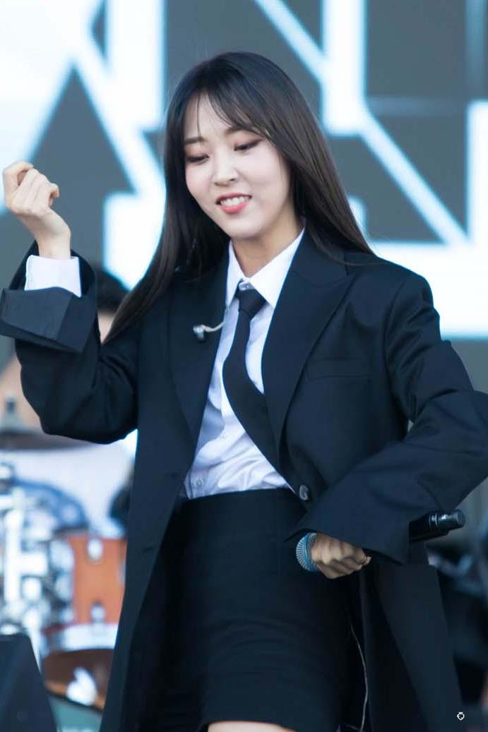 17.09.23 조이올팍페스티벌 - 마마무(MAMAMOO)